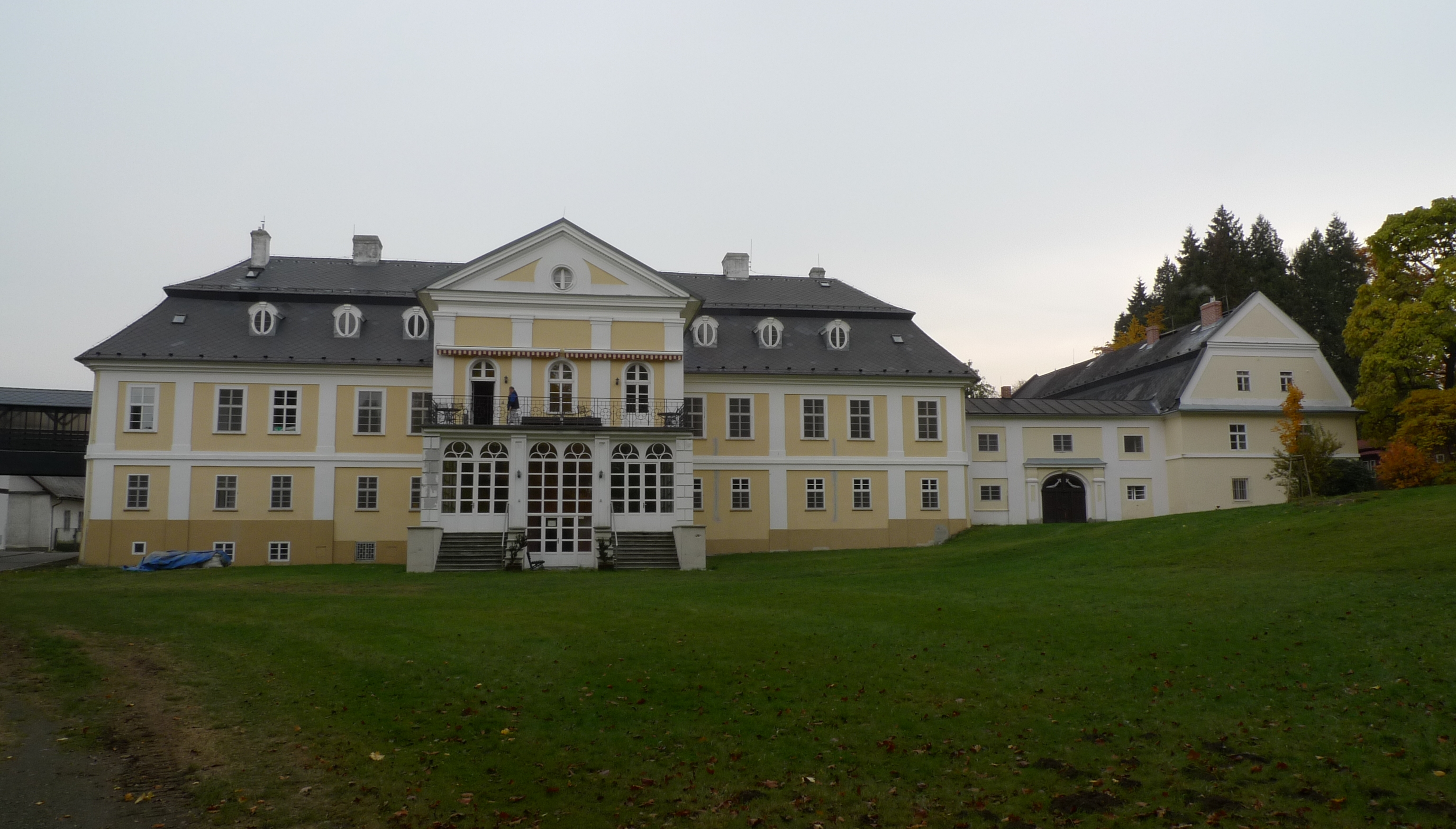 Kyjovice, zámek, dnes domov důchodců.